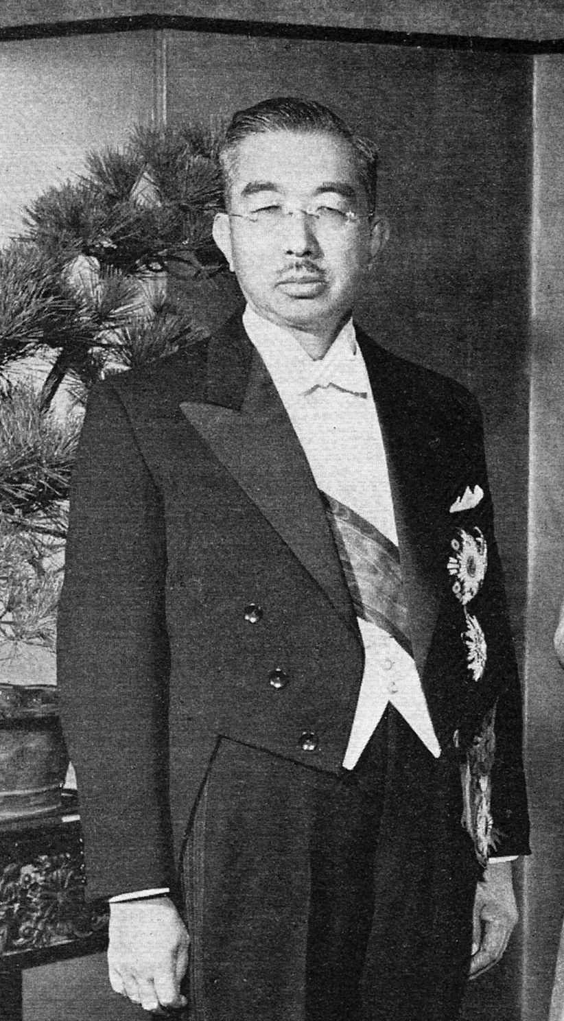 正装姿の昭和天皇